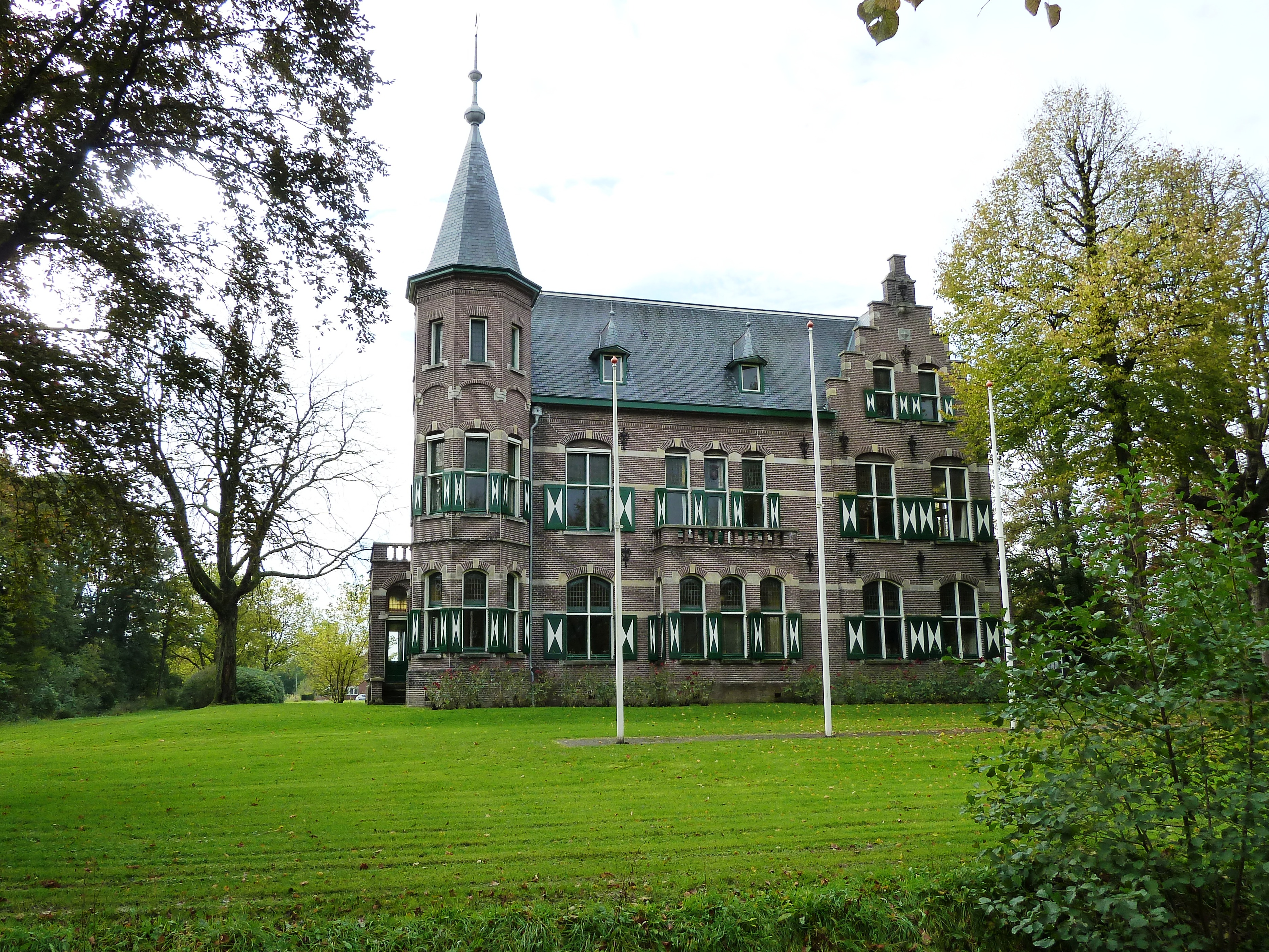 Voormalige kantoorwoning (nu gemeentehuis) aan de Hoofdstraat Winsum 70 in het Groningse dorp Winsum